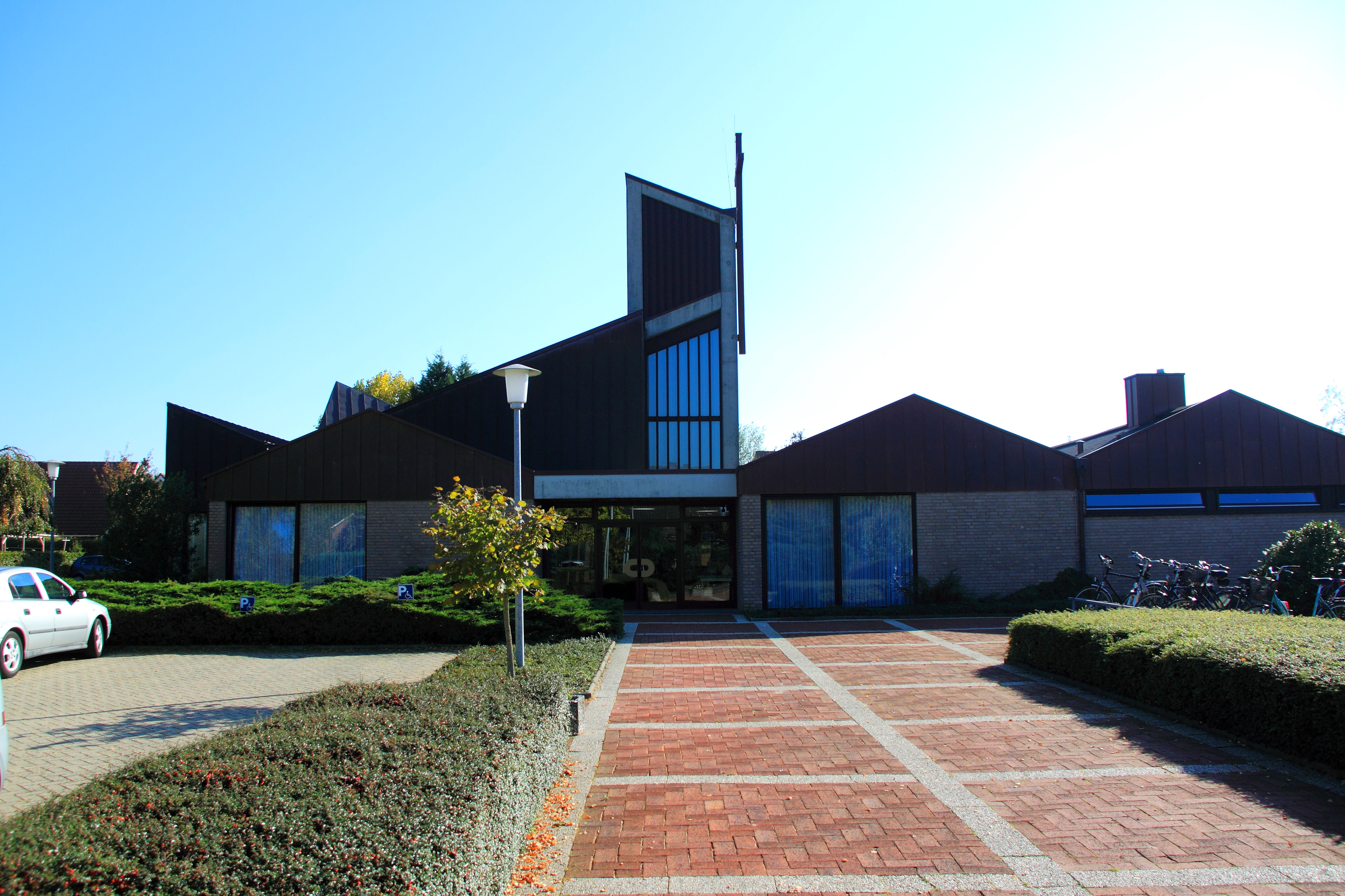 Altreformierte Kirche in Laar, Grafschaft Bentheim